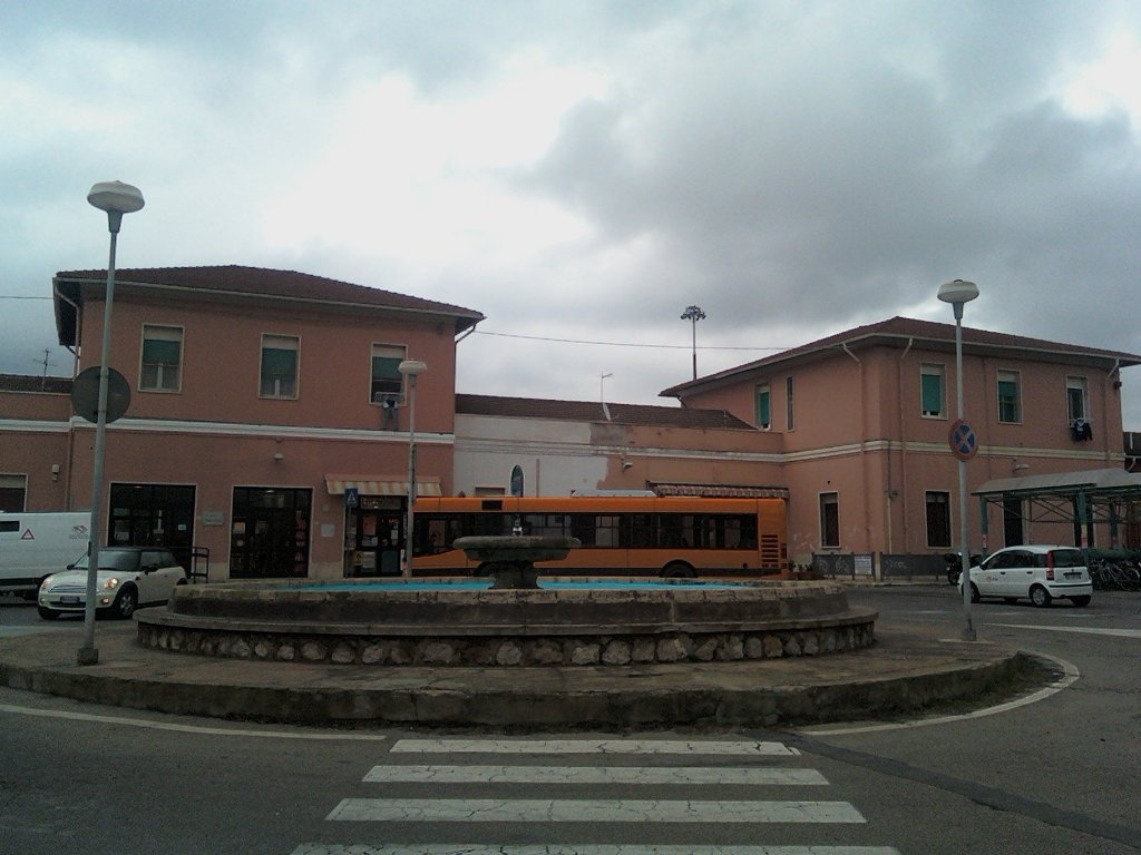 Interno della stazione di Orbetello